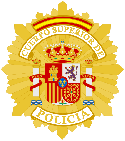 Cuerpo Superior de Policía